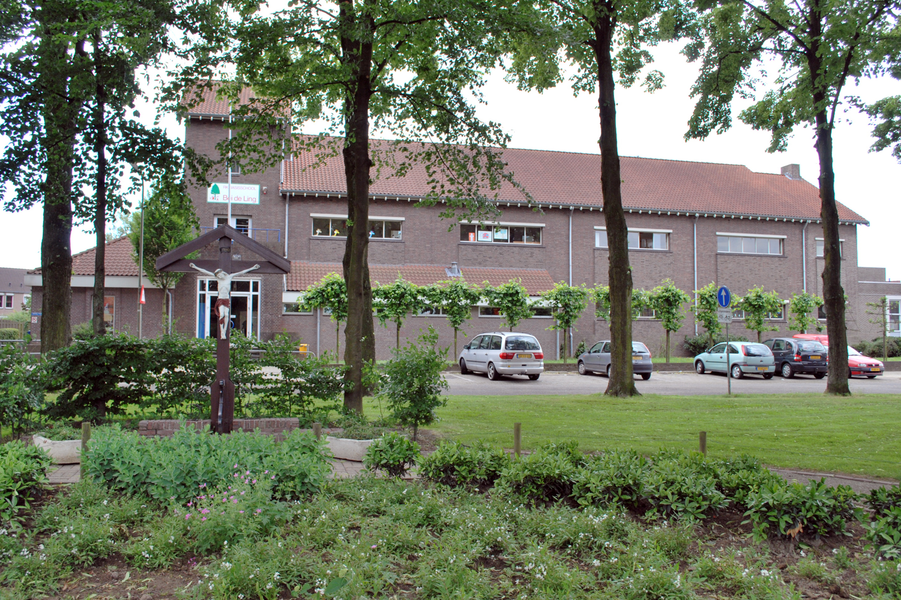 Basisschool "Bei de Ling" werd in 1931 in gebruik genomen als lagere school voor meisjes. Tot 1995 heette de school "Onze Lieve Vrouweschool". Tot 1961 werd de school geleid door de Zusters van Onze Lieve Vrouw. Architect was Ir. Jan Beersma van N.V. Laura & Vereeniging. Beersma bouwde ook de Don Boscoschool voor jongens alsmede kerk en Oratorium en het gemeentehuis van Ubach over Worms, tegenwoordig deel van de gemeente Landgraaf.